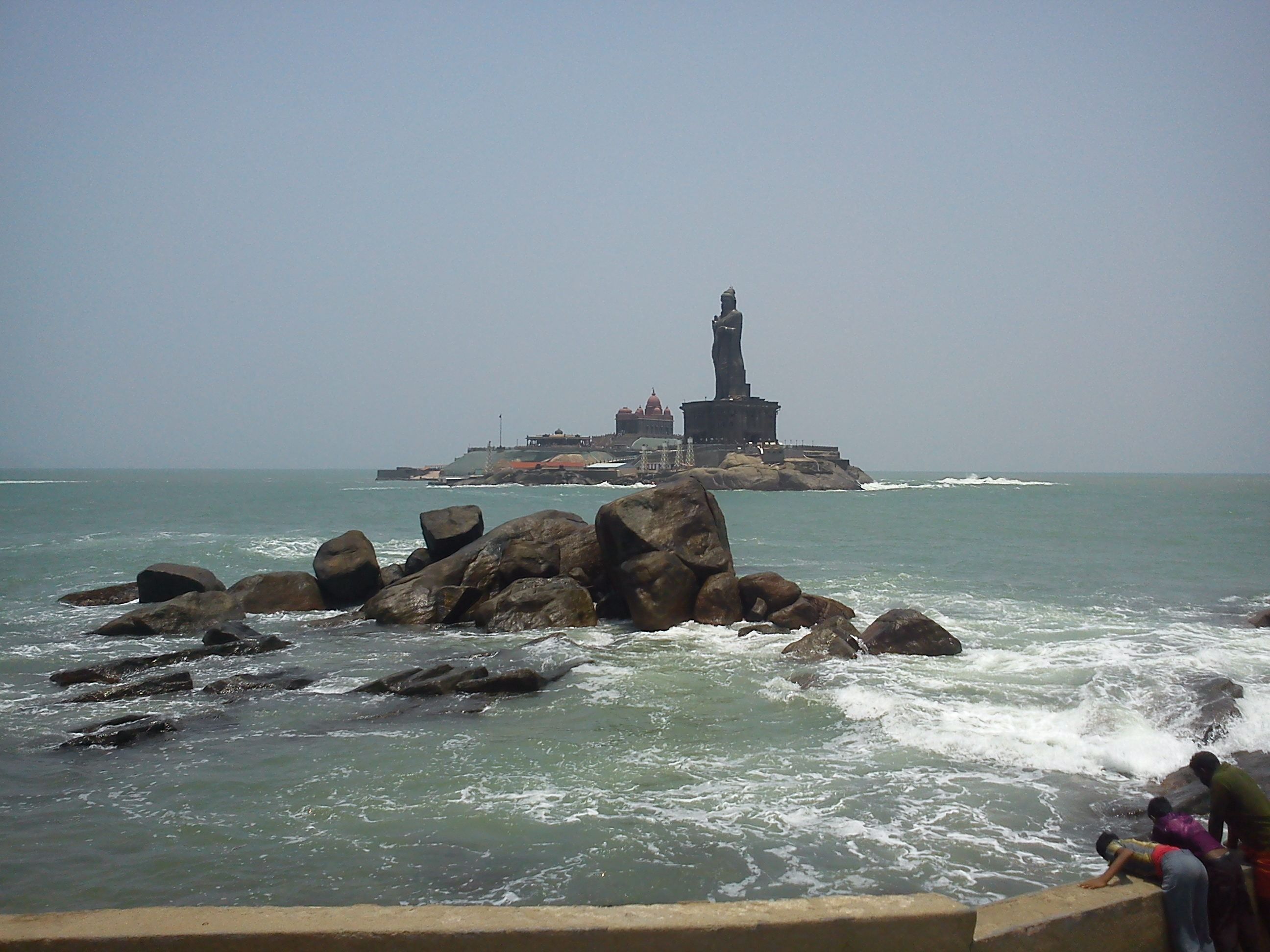 വിവേകാനന്ദപ്പാറ